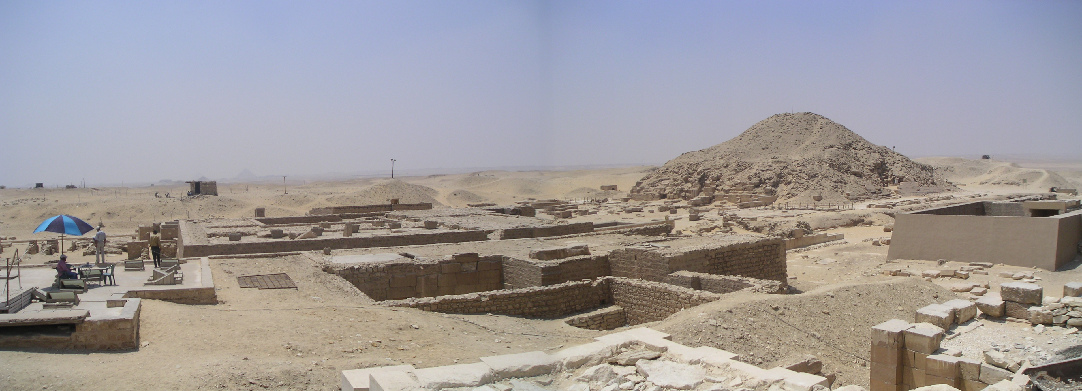 Vue panoramique du complexe funéraire d'Ounas et de ses environs, prise depuis l'enceinte de Djéser à Saqqarah